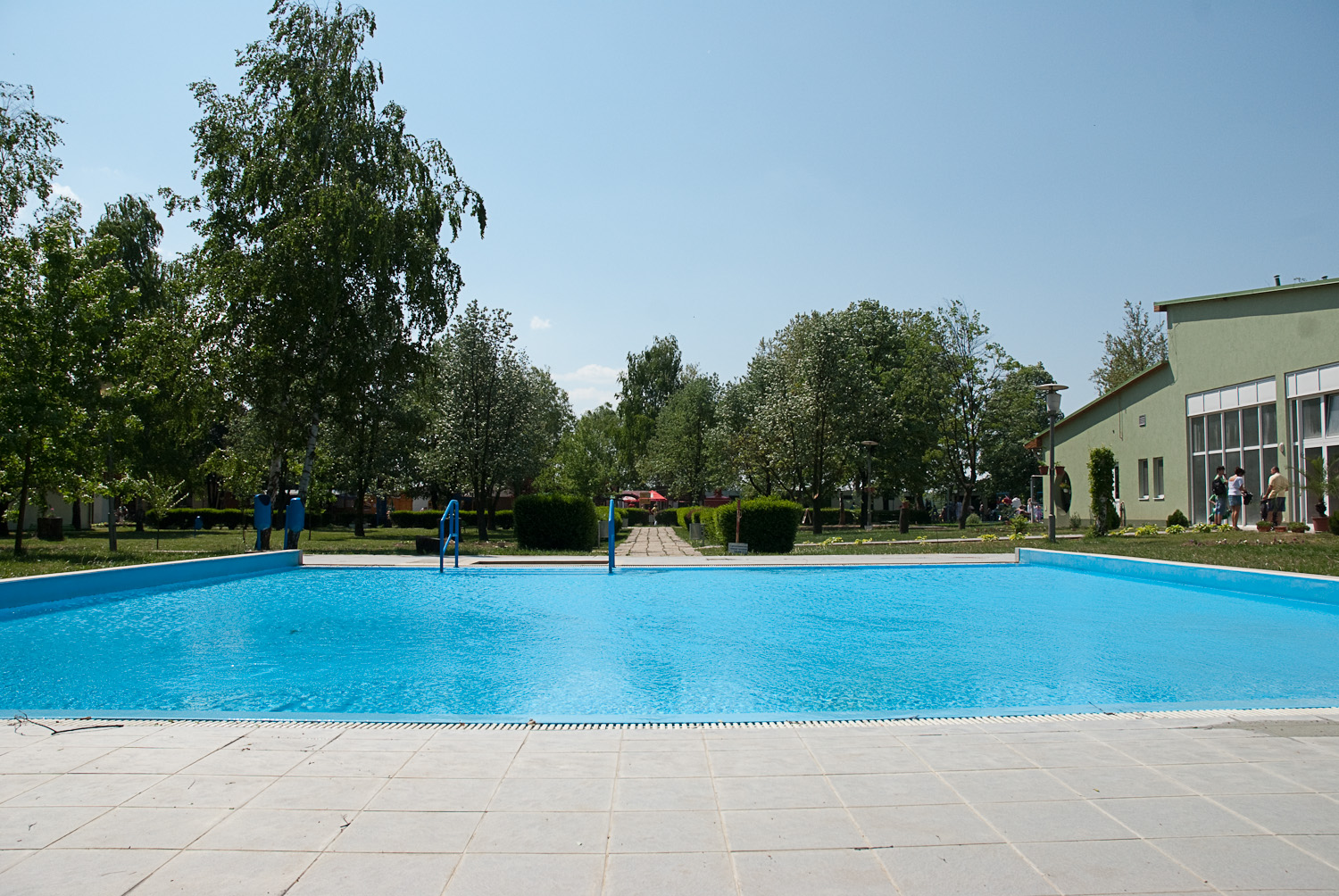 Tiszacsegei termálstrand (Hajdú-Bihar megye)